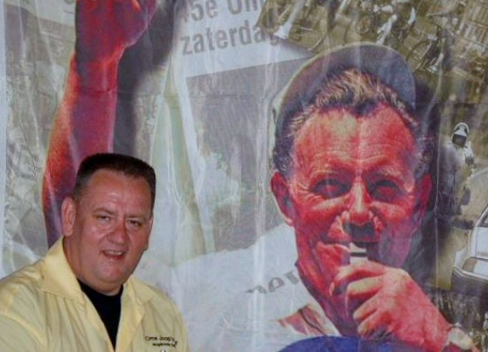 Organisator Ome Joops Tour